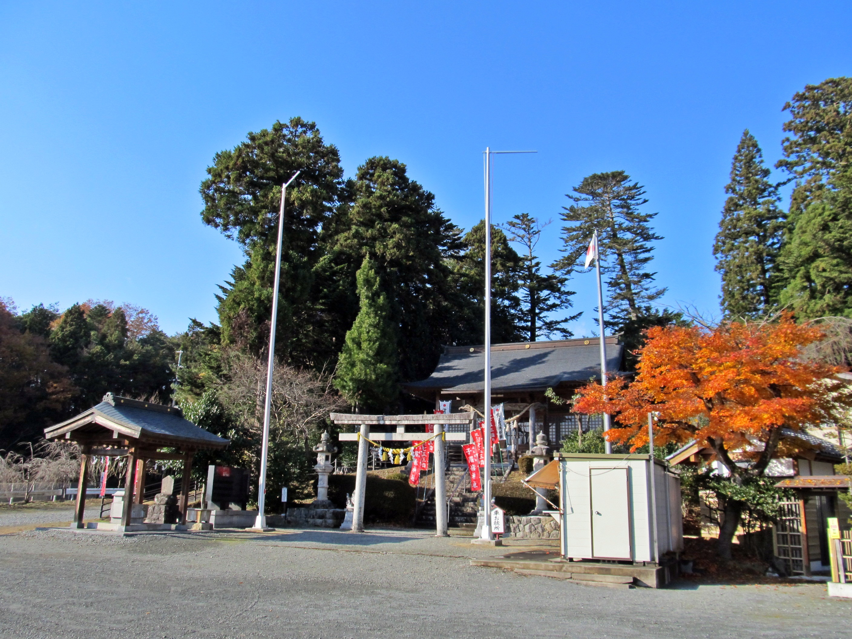 子眉嶺神社境内